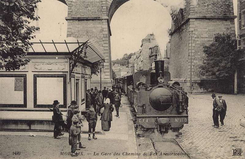 Train des Chemins de Fer Armoricains à Morlaix (locomotive Corpet Louvet n°1353 de 1911).